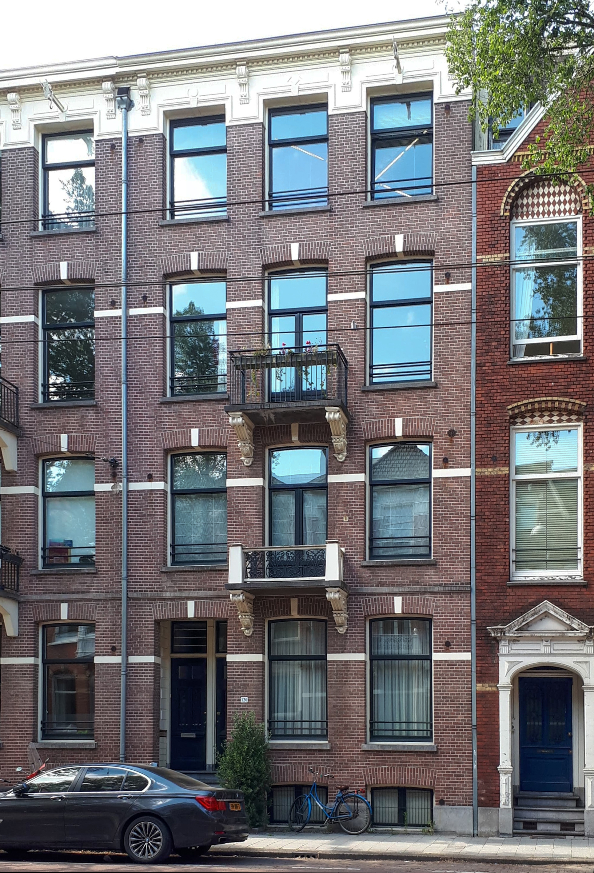 Willemsparkweg 120, Amsterdam - Sitz der Fotoagentur von Maria Austria